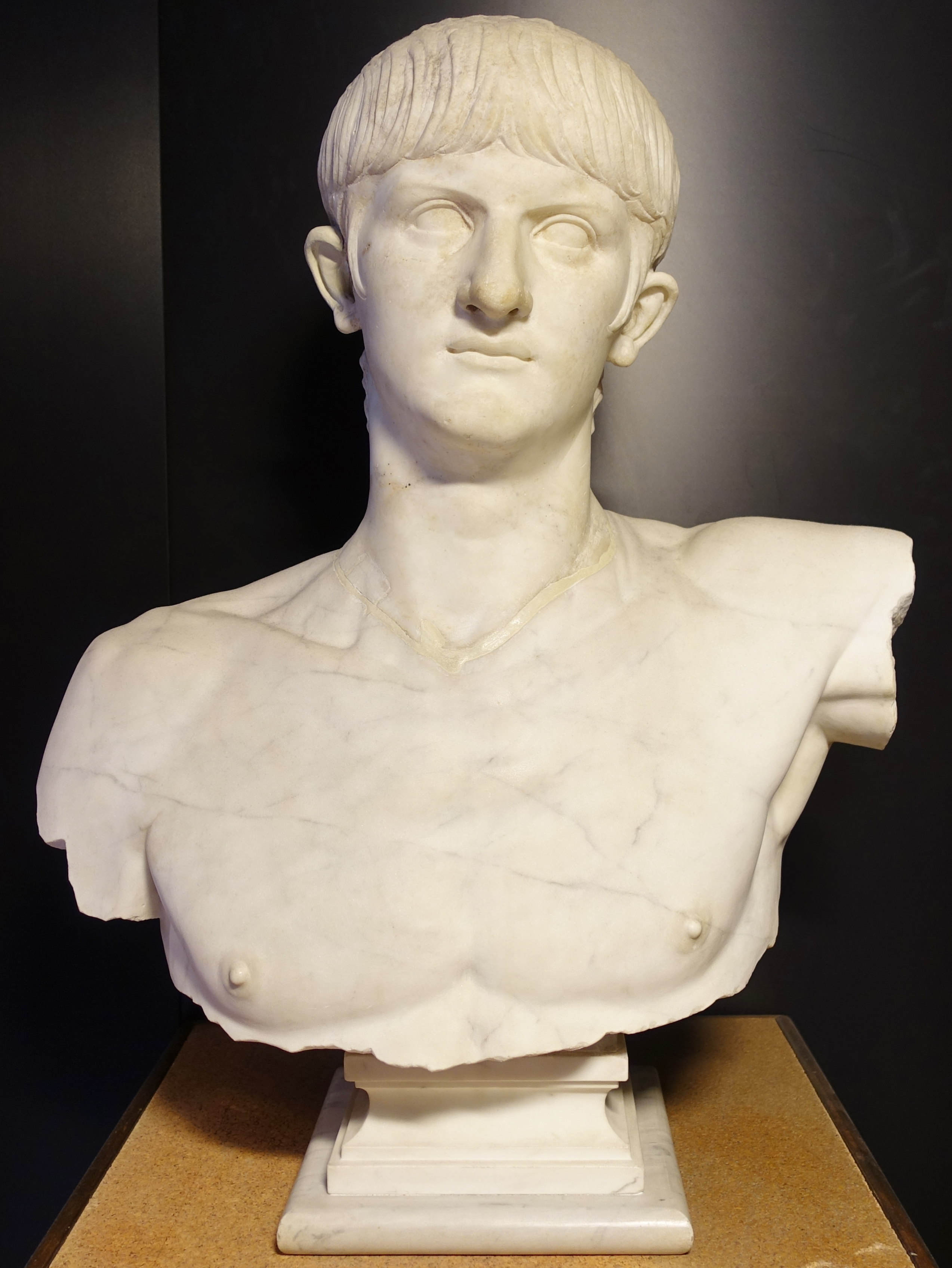 Büste des Kaisers Nero (54–59 n. Chr., Kopf ursprünglich nicht passend zum Körper), gefunden in Olbia, Archäologisches Nationalmuseum Cagliari, Sardinien, Italien